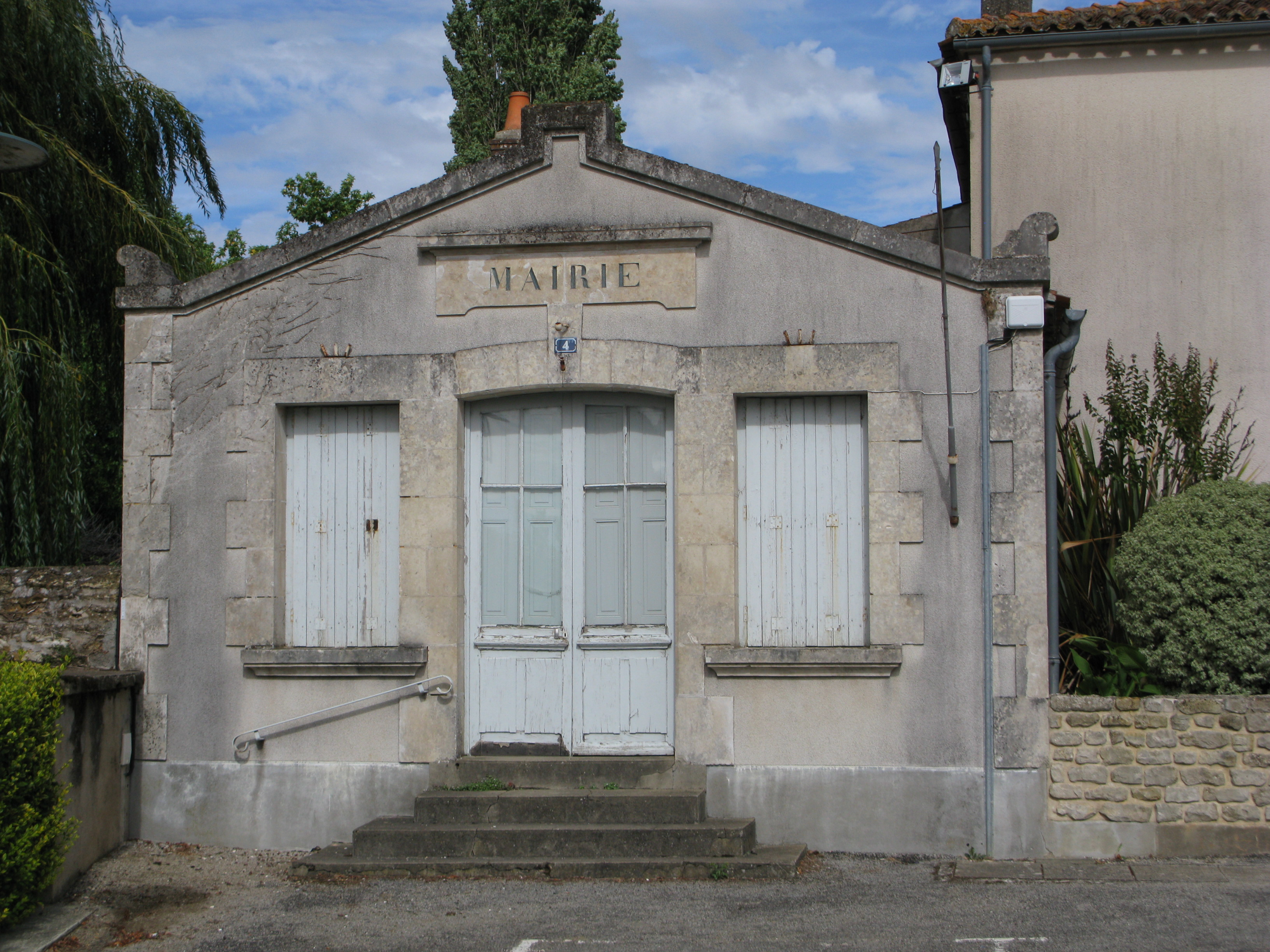 Ancienne mairie de Moutiers-sur-le-Lay